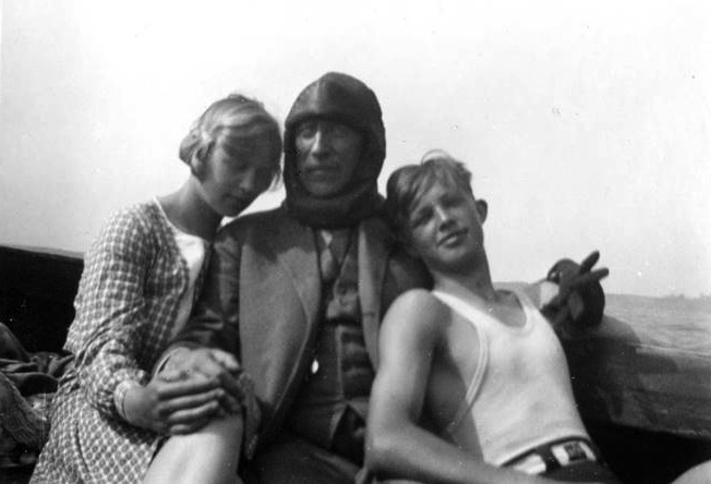 Fotografi